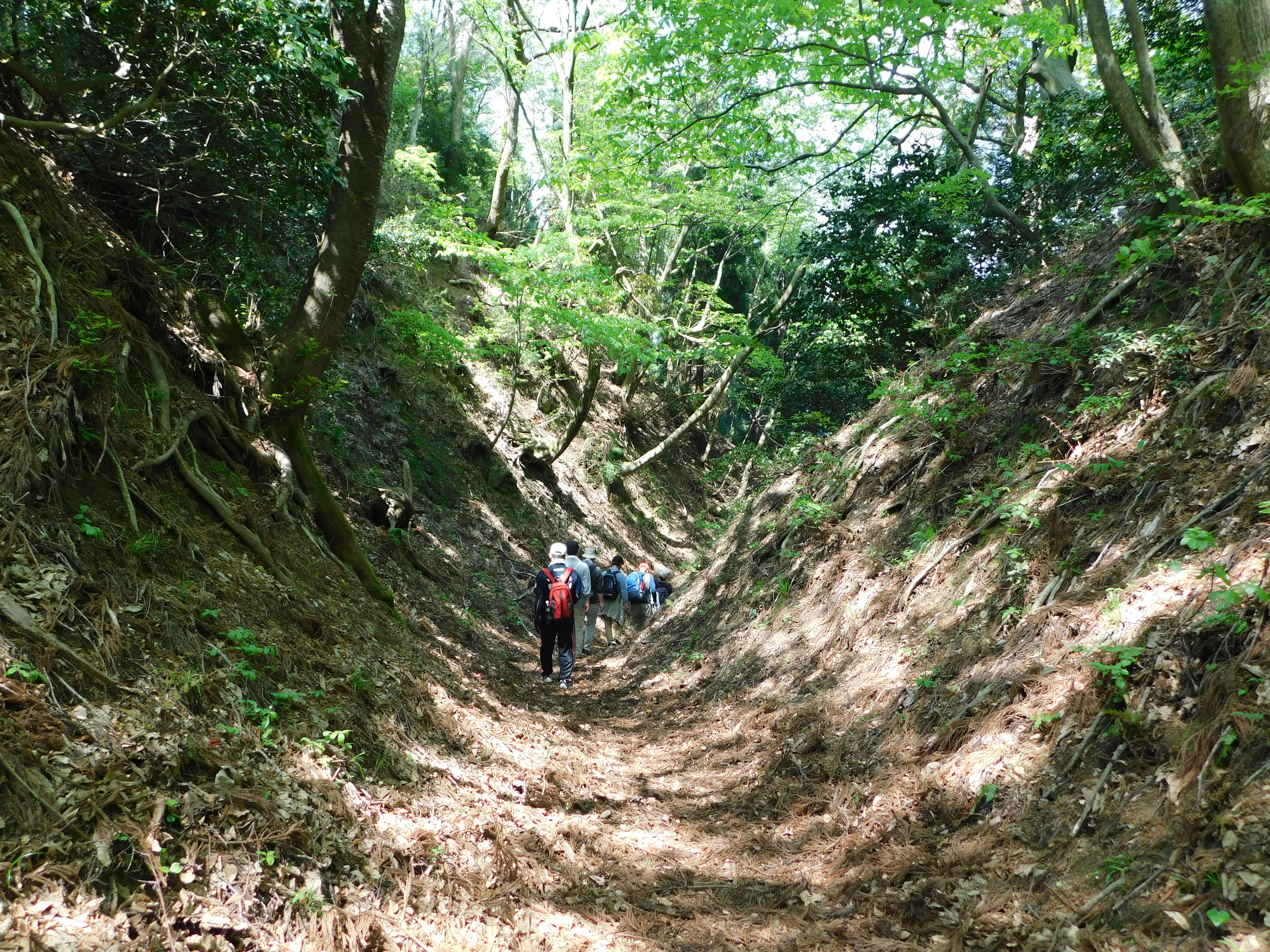 福井県越前市の府中馬借街道(西街道ともいう)、敦賀湊～河野・今泉浦(海上七里)～梨木峠～中山峠～湯谷～大坂峠～当ヶ峰～追分～広瀬～馬塚～府中(陸上四里)の街道、鎌倉時代から戦国時代にかけては軍事面でも重要な交通路であった、江戸時代には北前船の発展に伴い、物資輸送路として隆盛した。